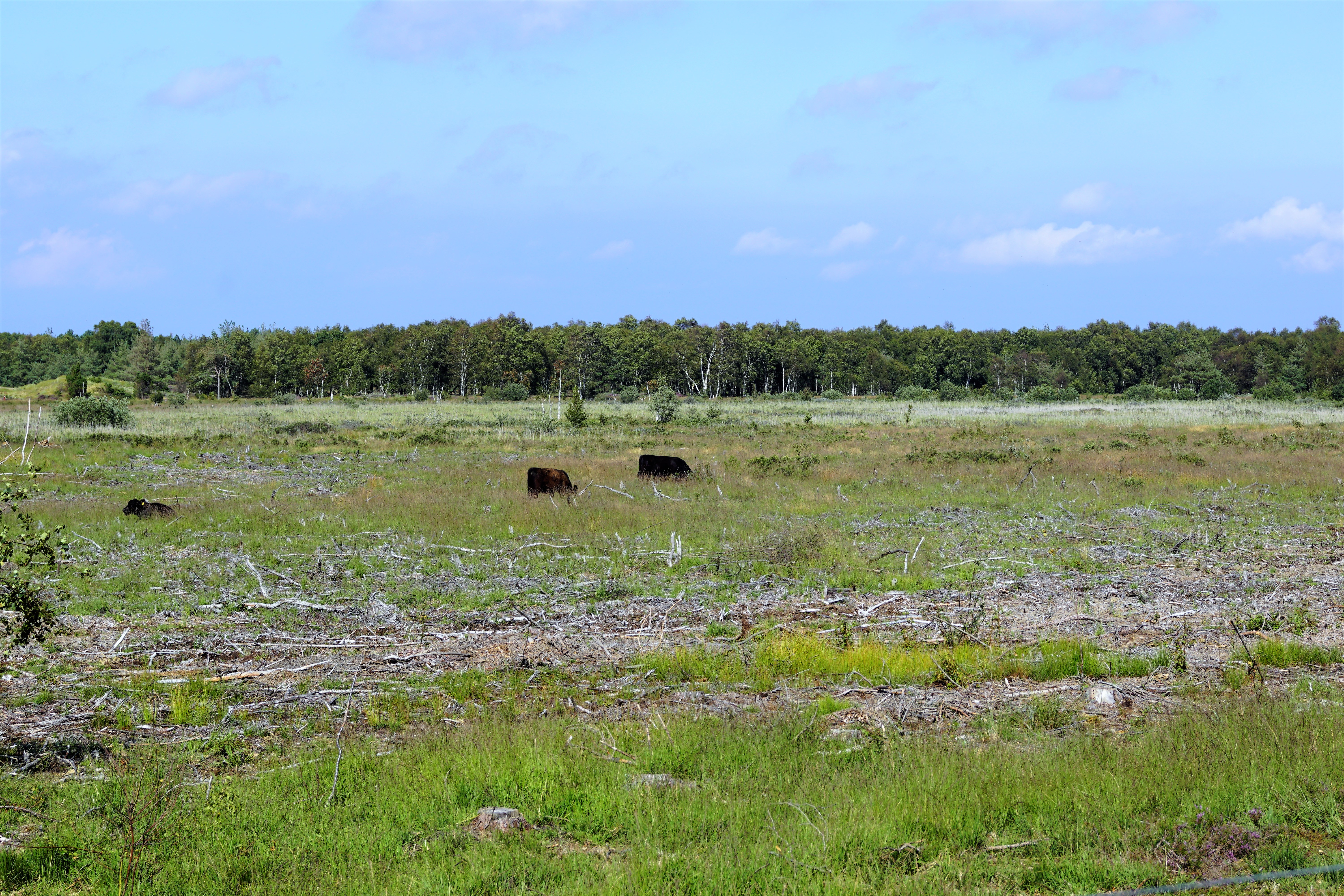 Den næsten tilgroede Foldgårdssø